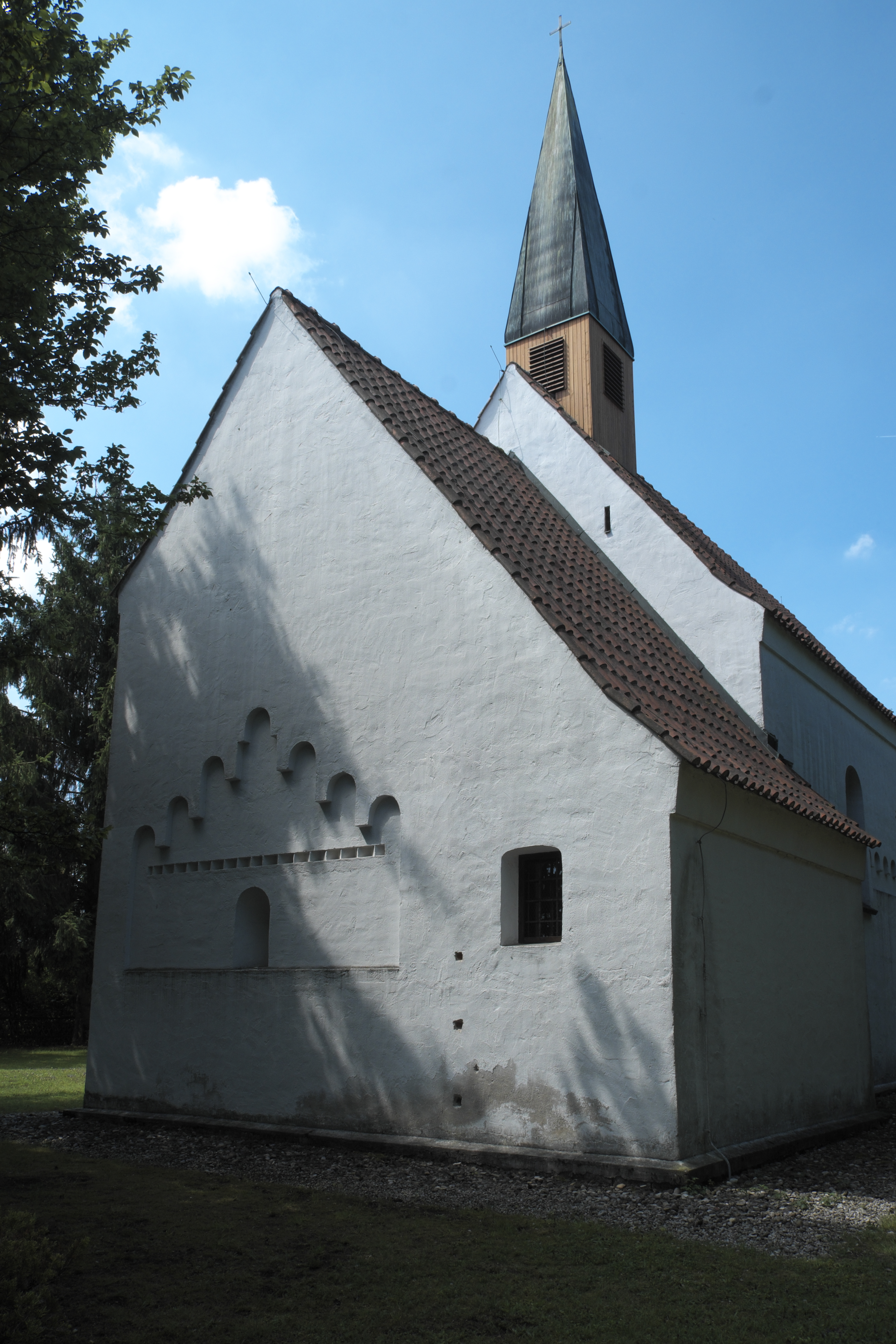 Katholische Nebenkirche St. Martin in der Wüstung Mallertshofen (Oberschleißheim) im Landkreis München (Bayern/Deutschland)